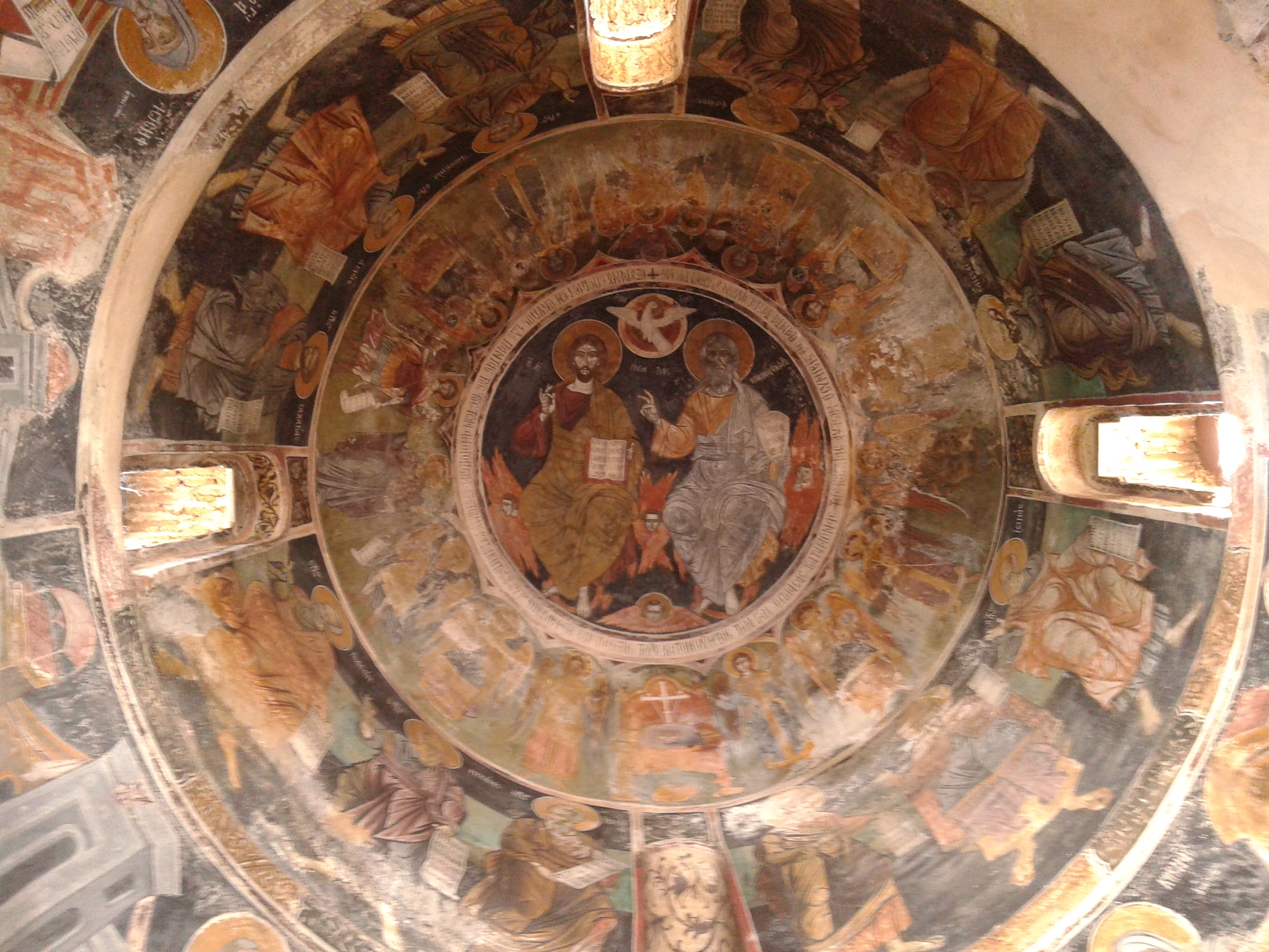 Μονή Καισαριανής. Ο τρούλος του εξωνάρθηκα με την αγιογραφία της Αγίας Τριάδας.«Μονή Καισαριανής»